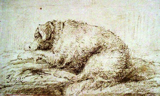 "O cão", desenho de D. Fernando II, o "Rei-Artista".